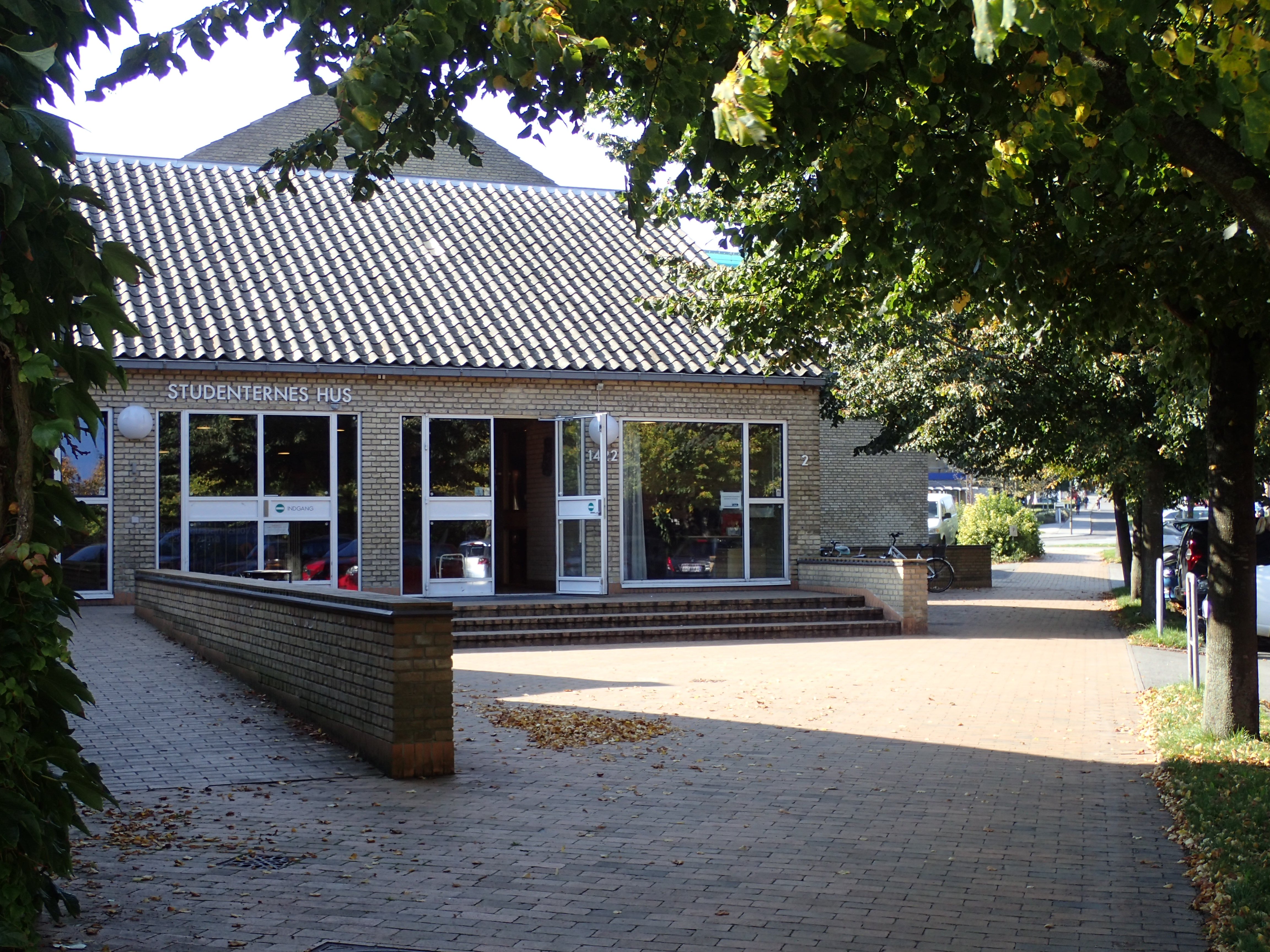 Studenternes Hus, indgangen ved Fredrik Nielsens Vej.